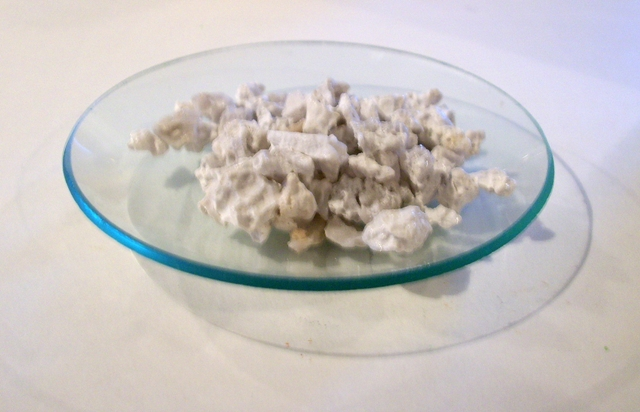 CaCl2